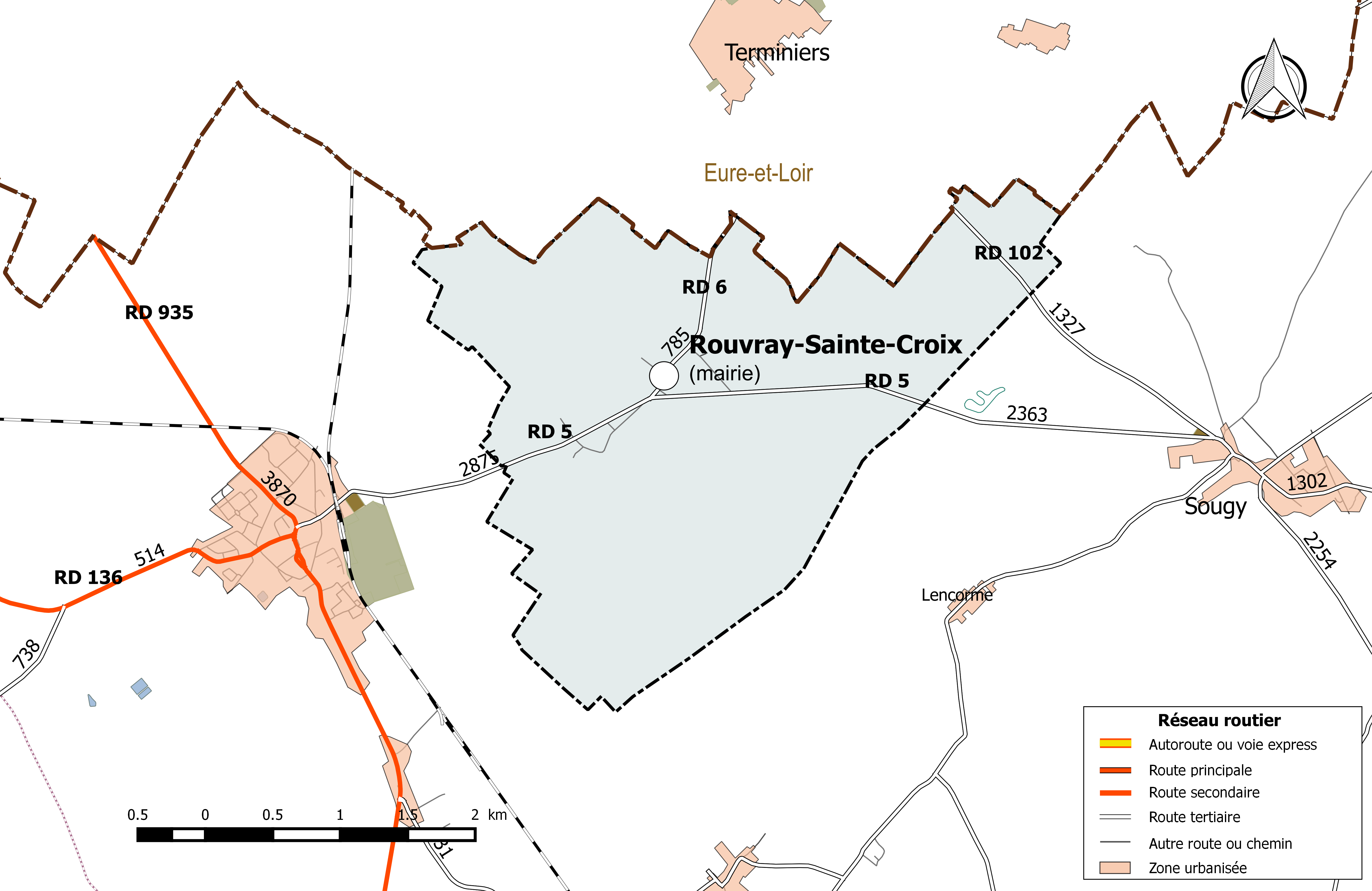 Carte du réseau routier de la commune de Rouvray-Sainte-Croix.